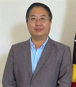 Chinas Botschafter Liu Hongyang in Osttimor